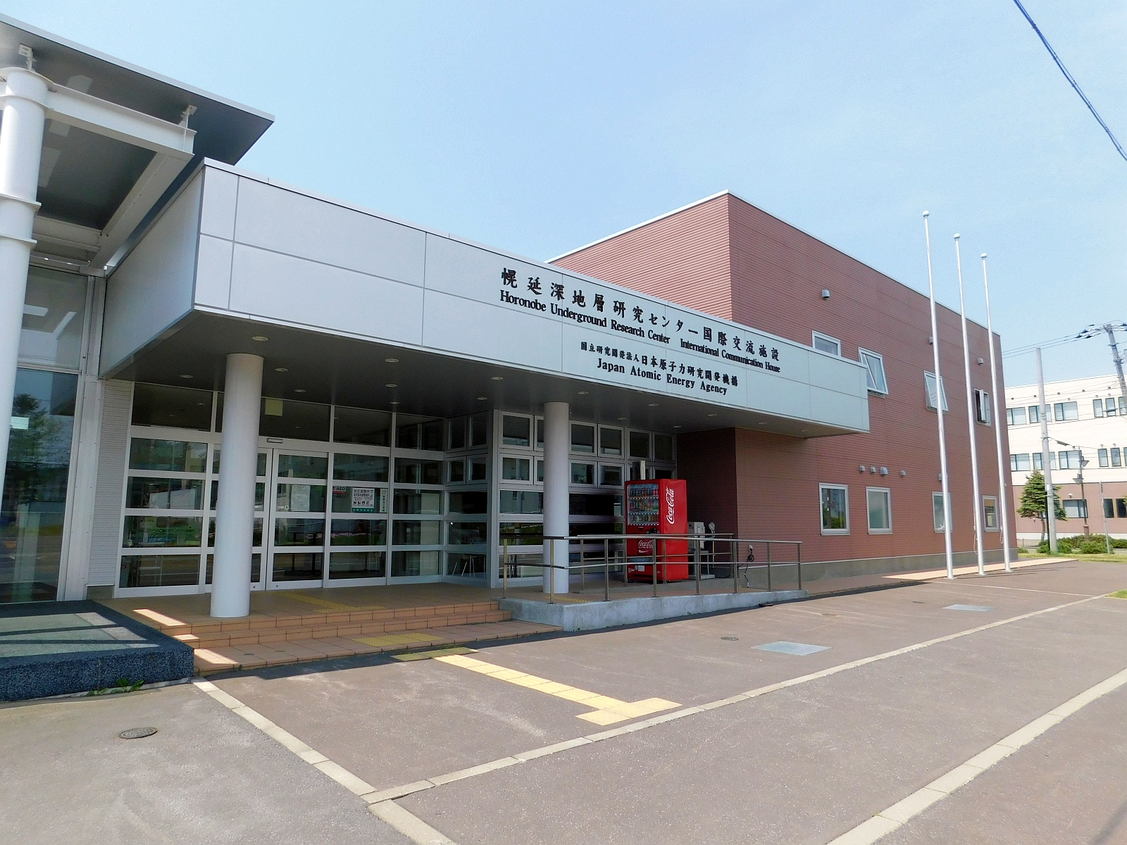 北海道天塩郡幌延町にある幌延深地層研究センター国際交流施設。棟続きで幌延町生涯学習センターがある。